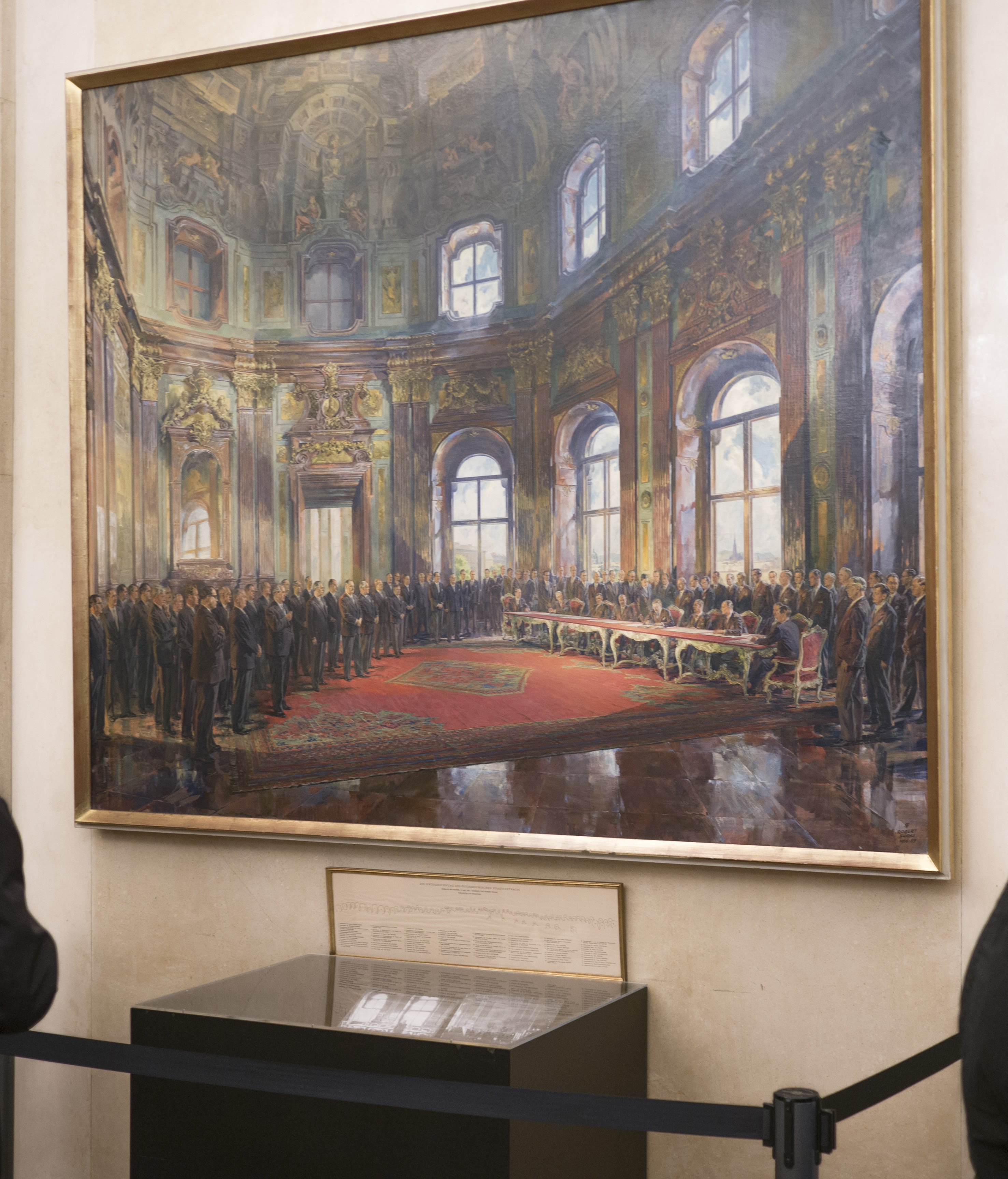 Österreichischer Staatsvertrag Gemälde in der Hofburg